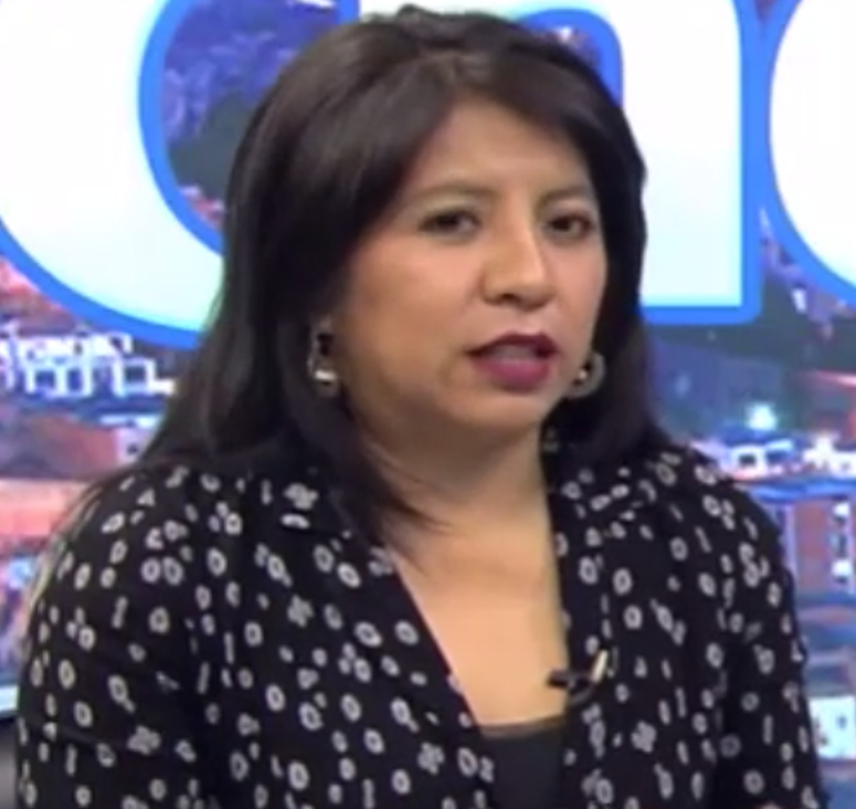 Nadia Cruz en agosto de 2019